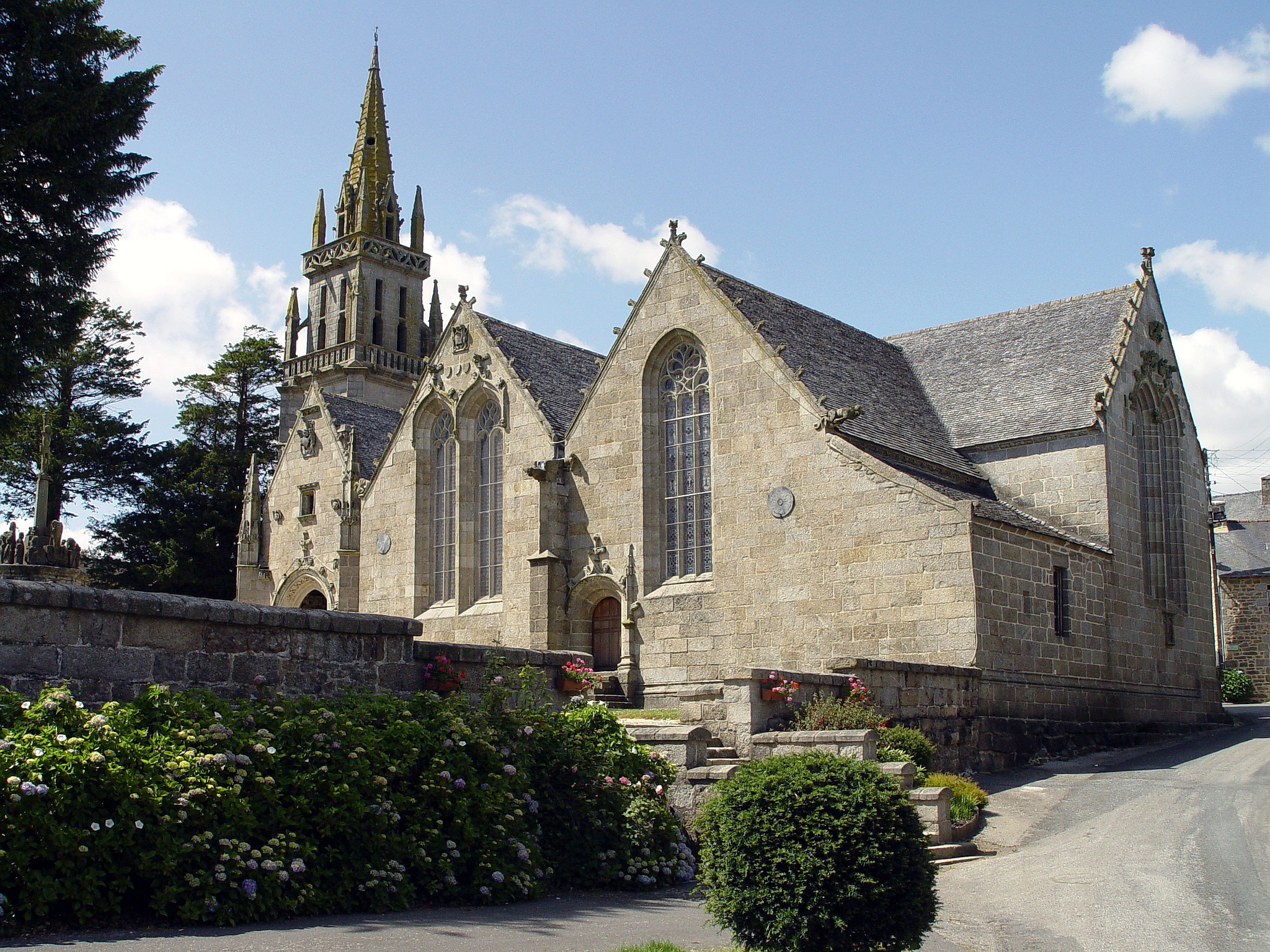 Kirche und Kirchhof mit monumentalem Kalvarienberg in Kergrist Moelou (Bretagne-Cotes d'Armor)